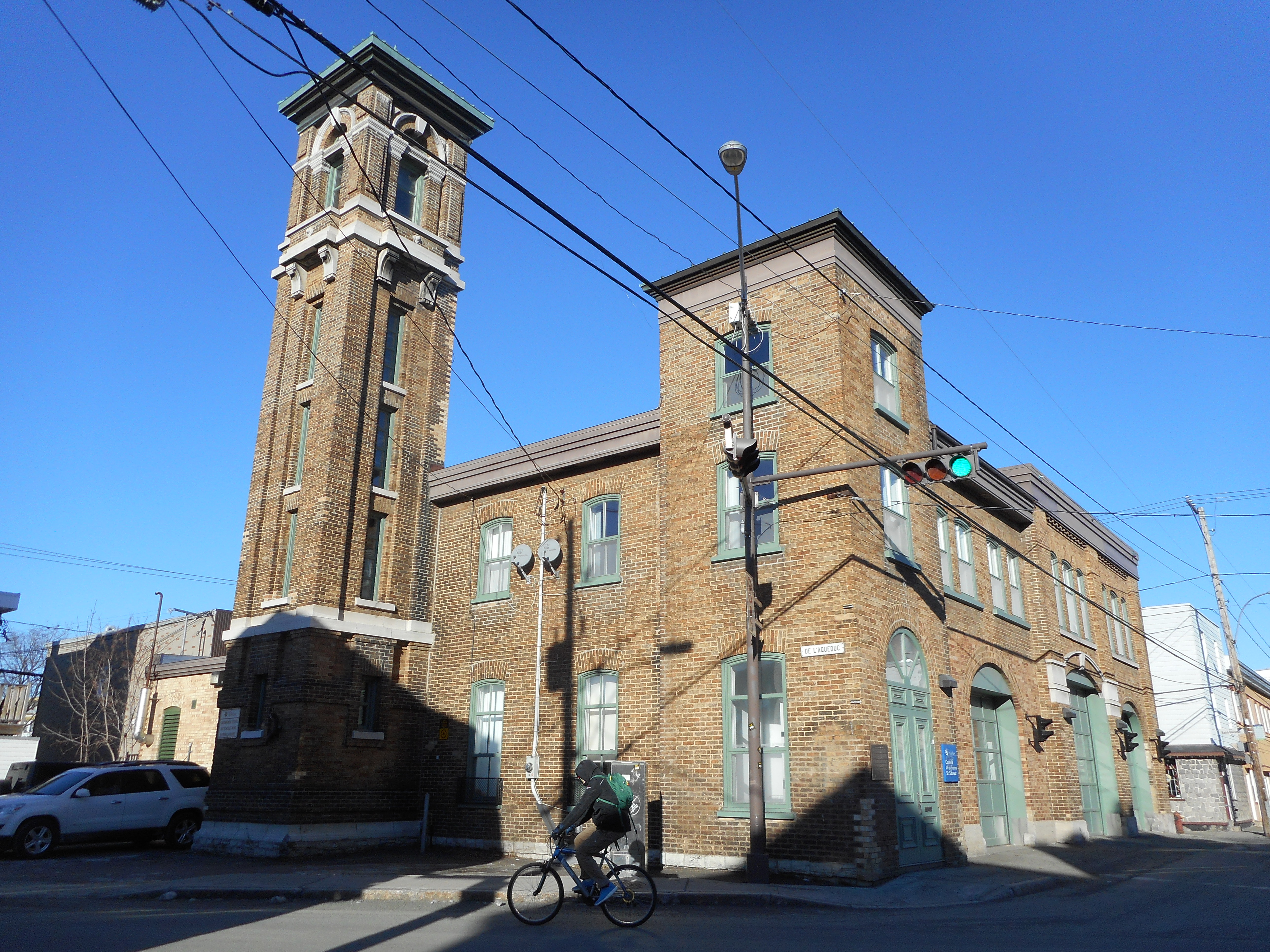 Caserne Georges-Émile-Tanguay (caserne 3, de Saint-Sauveur), 600, avenue des Oblats, intersection rue de l'Aqueduc, Québec